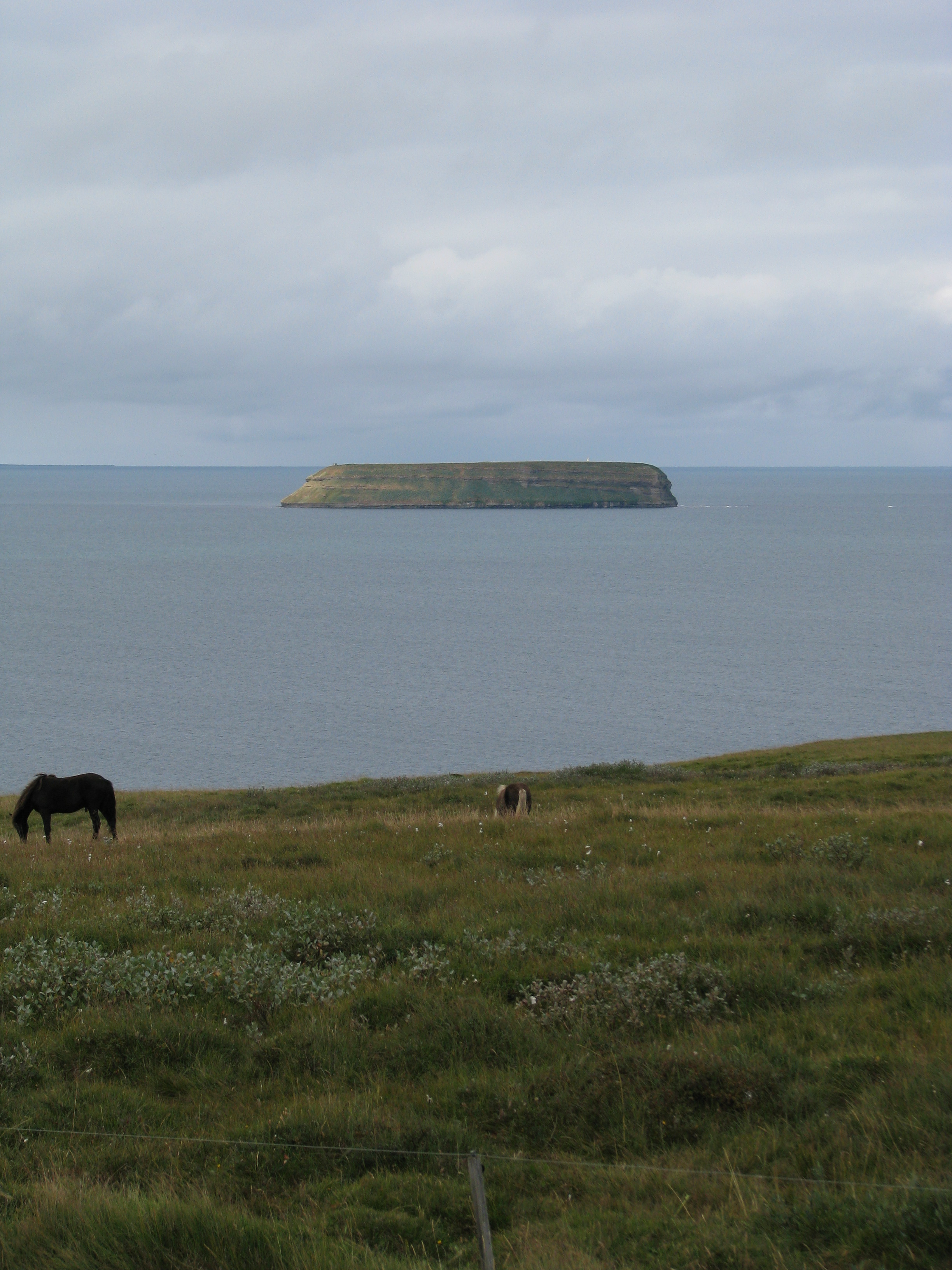 The island Lundey in the Skjálfandi, Iceland.